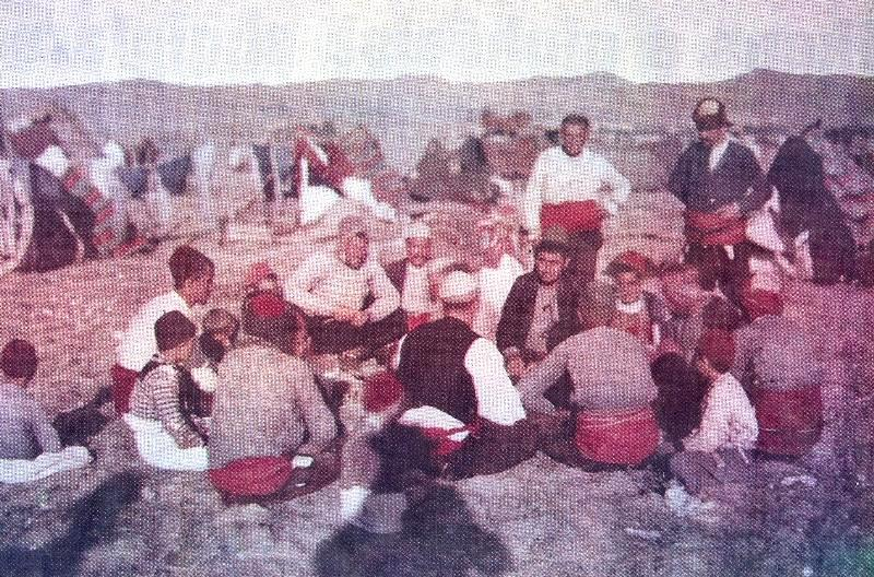 Shqiptaret e debuar nga ushtria serbe, ne rruge per Turqi